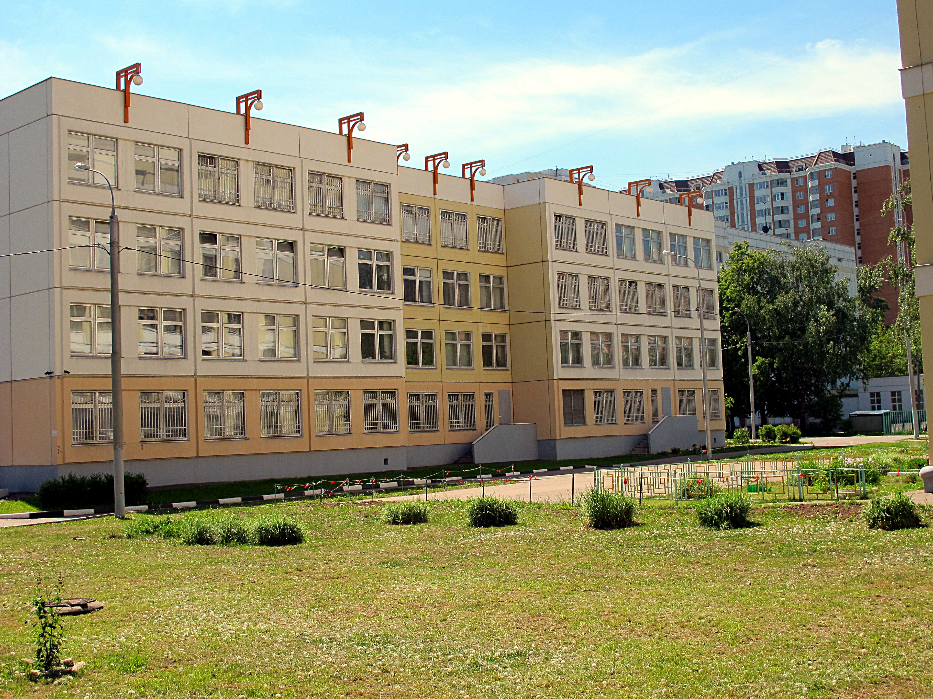 2011-05-28 Дворик школы № 276